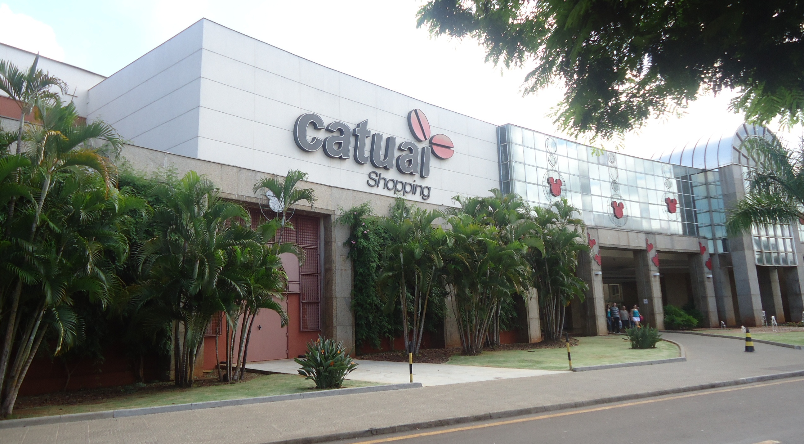 catuailondrina